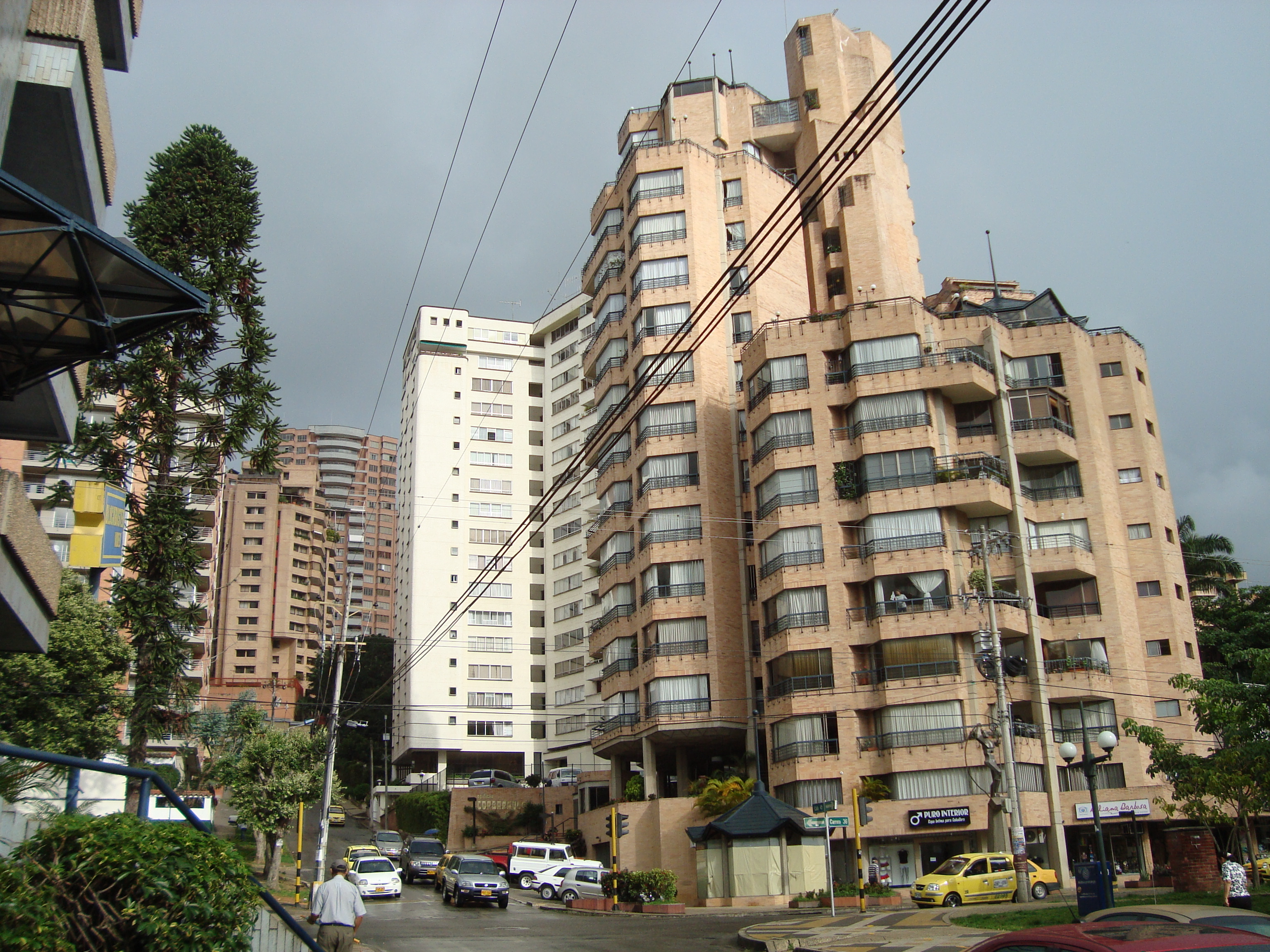 Se aprecia la arquitectura usada en los edificios residenciales de la ciudad de bucaramanga.